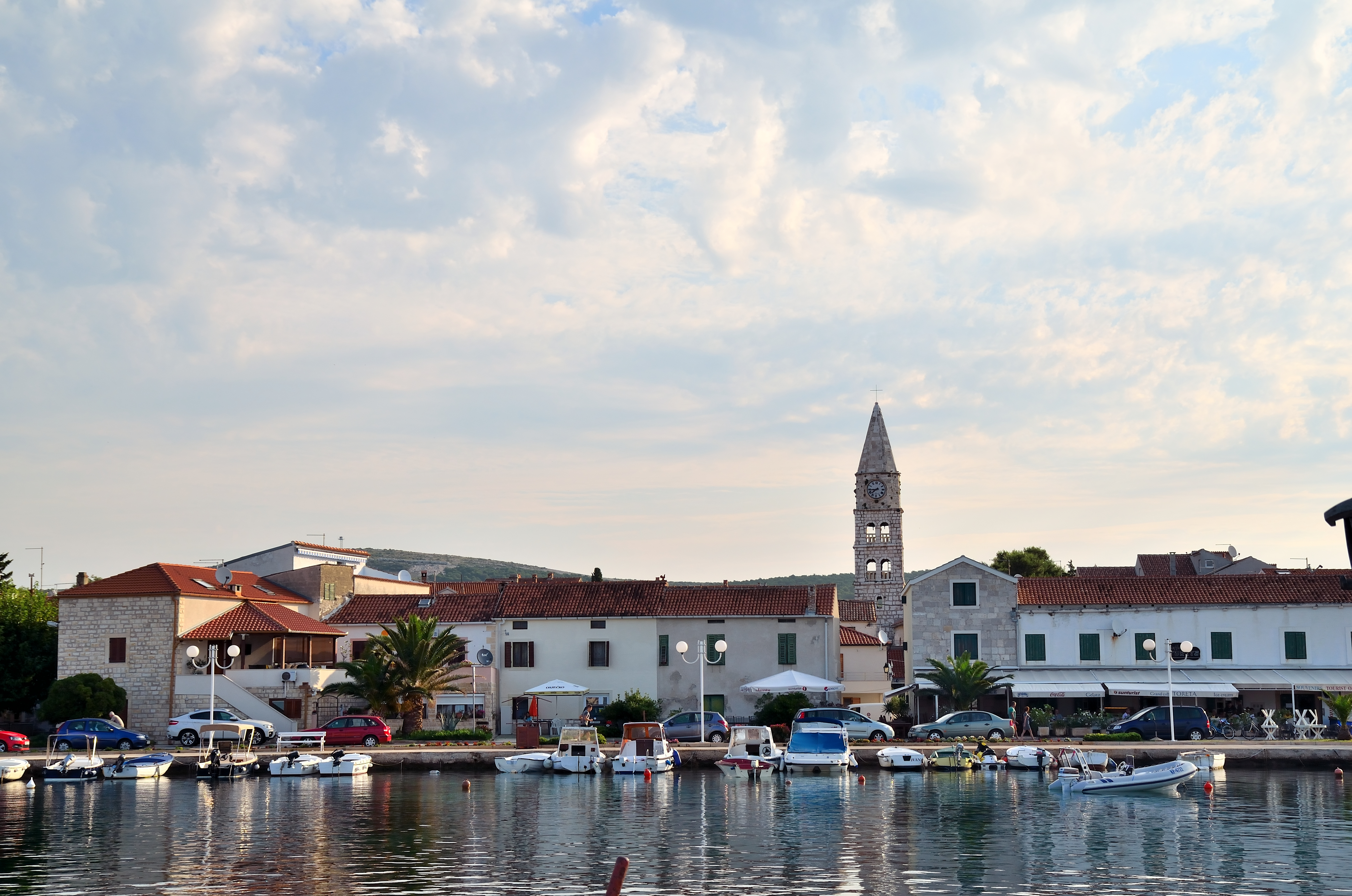 TURANJ